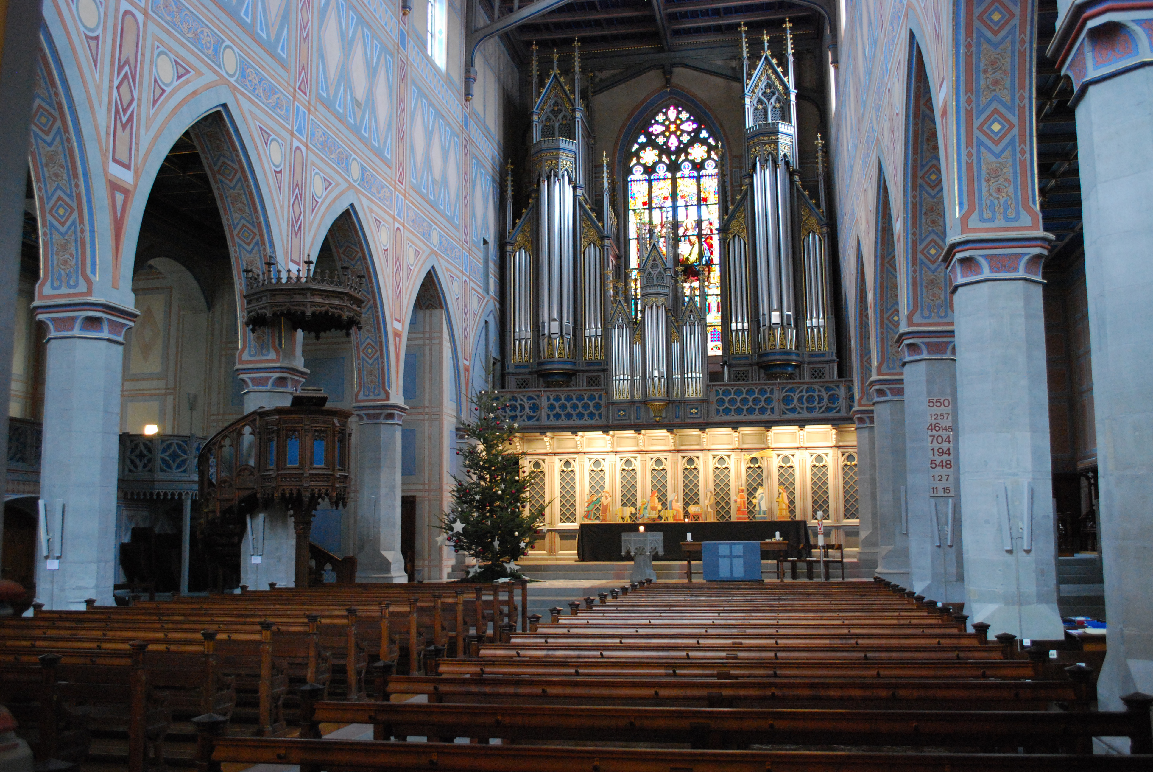 Kirche St. Laurenzen, Innenraum